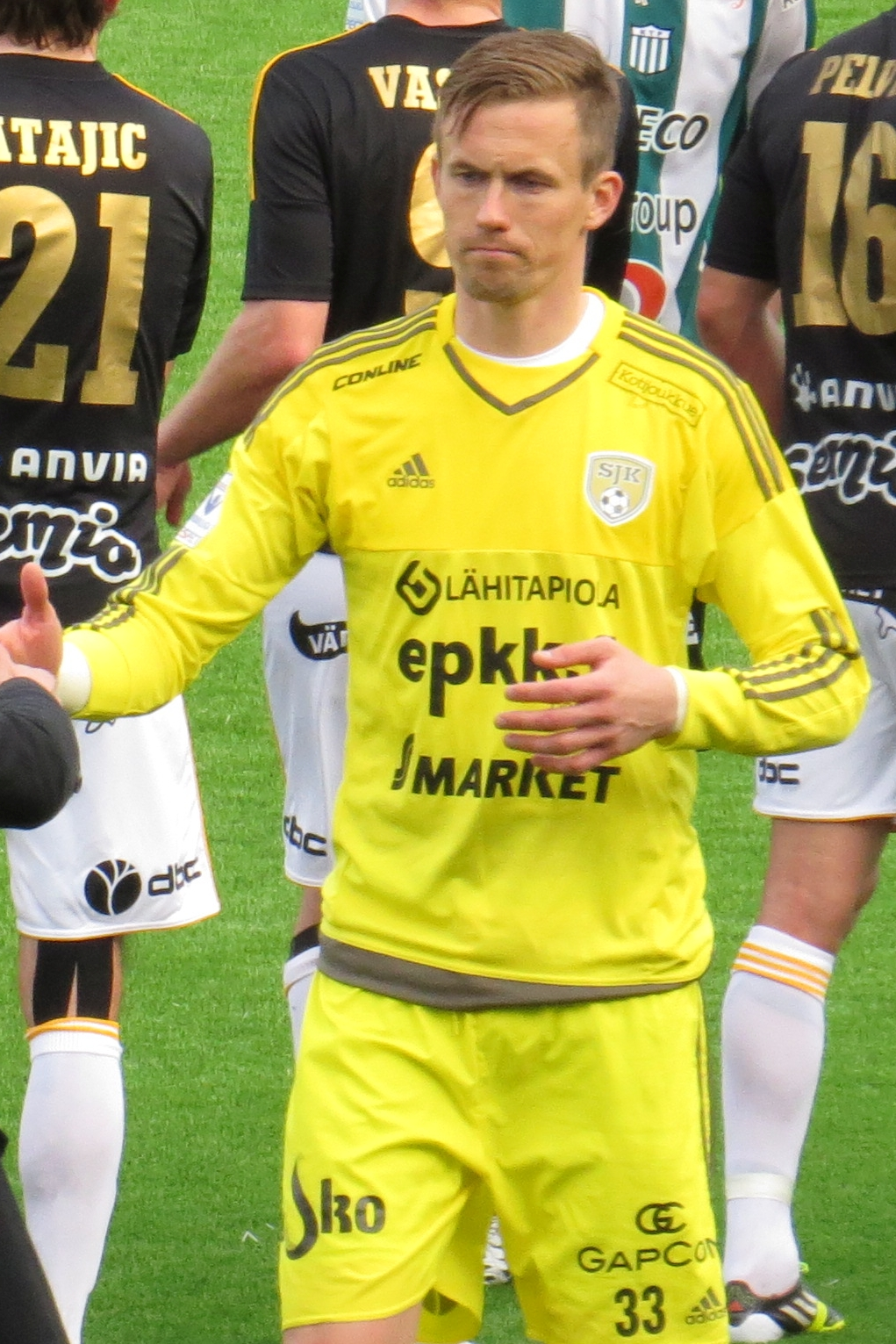 Mihkel Aksalu, virolainen jalkapallomaalivahti Seinäjoen Jalkapallokerhon joukkueessa kaudella 2015.